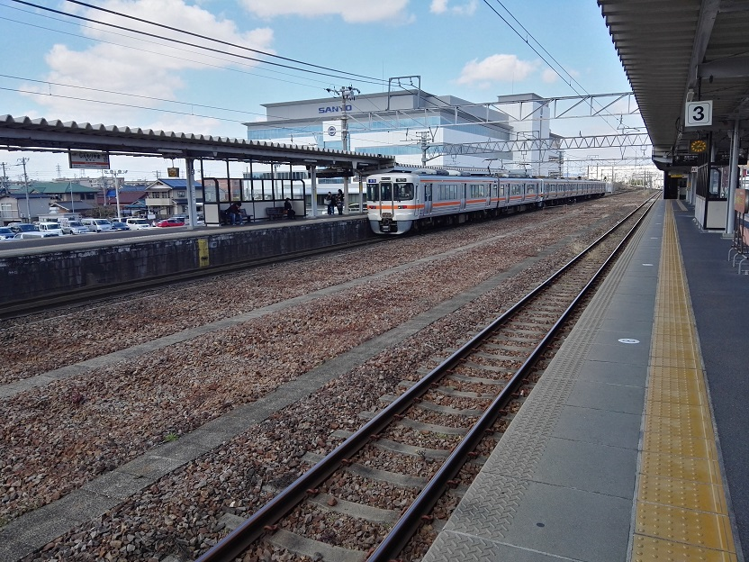 JR Shin-moriyama station platform